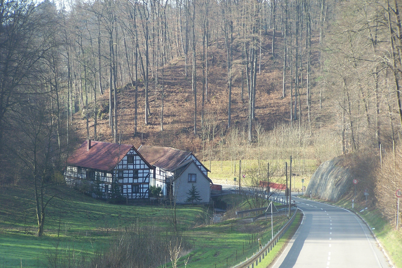 Die Untermühle bei Heyerode.